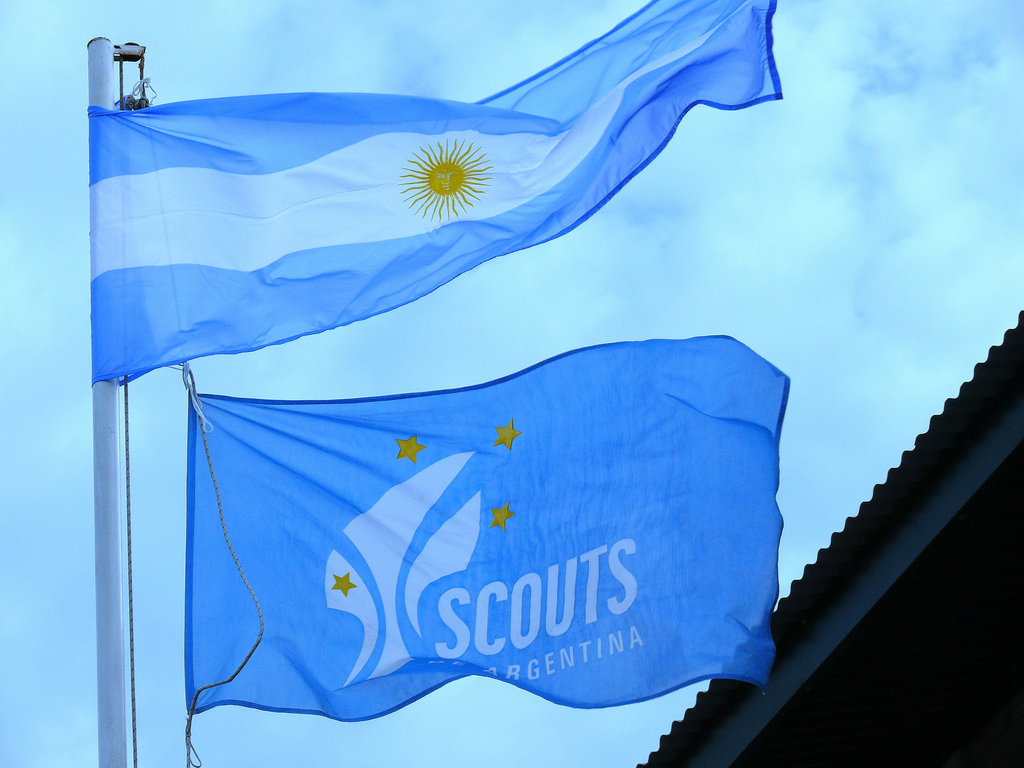 Bandera Argentina y bandera de Scouts de Argentina Asociación Civil izadas en un mástil